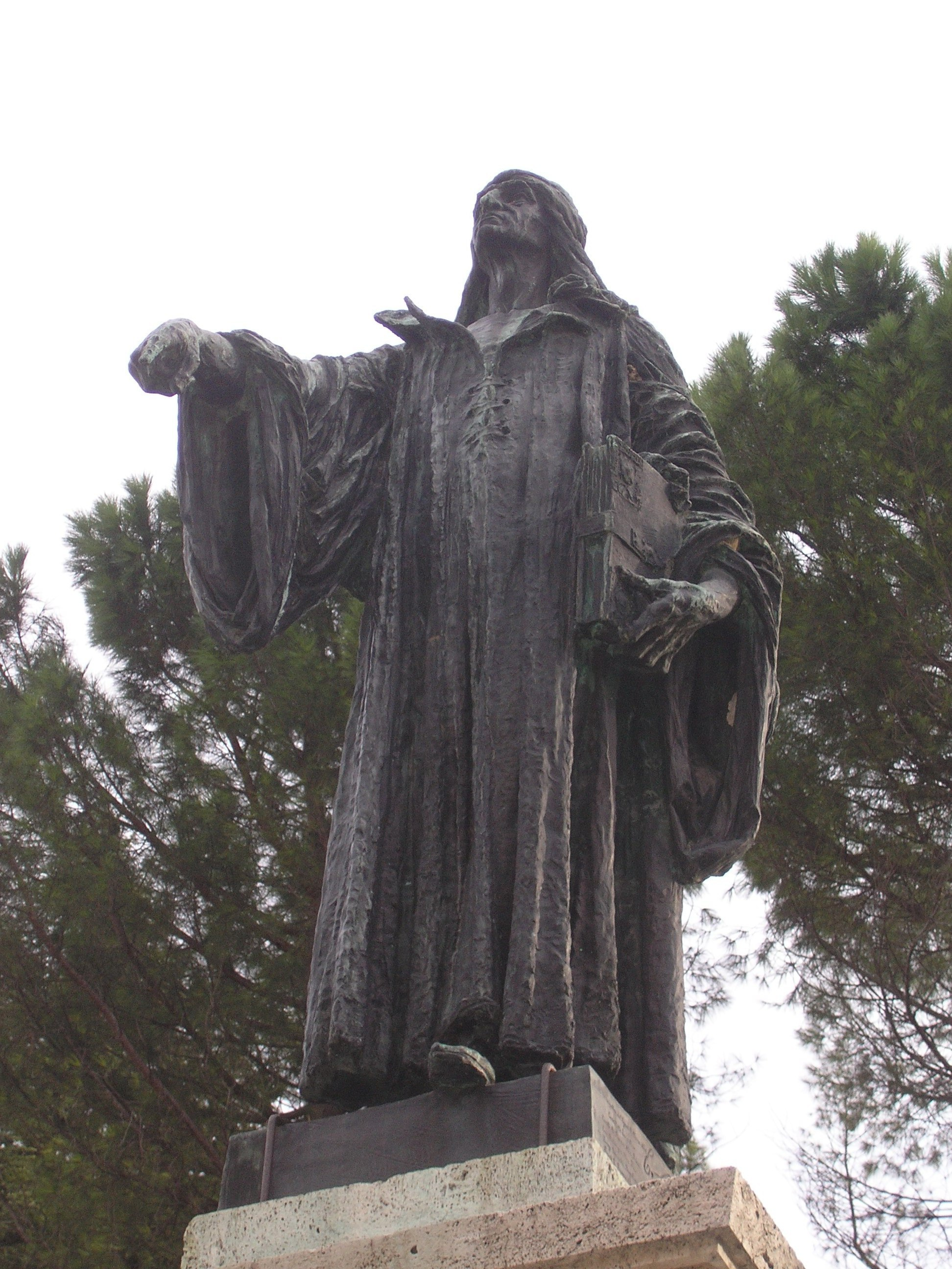 Particolare della statua di Cecco d'Ascoli, in Piazza Matteotti, ad Ascoli Piceno